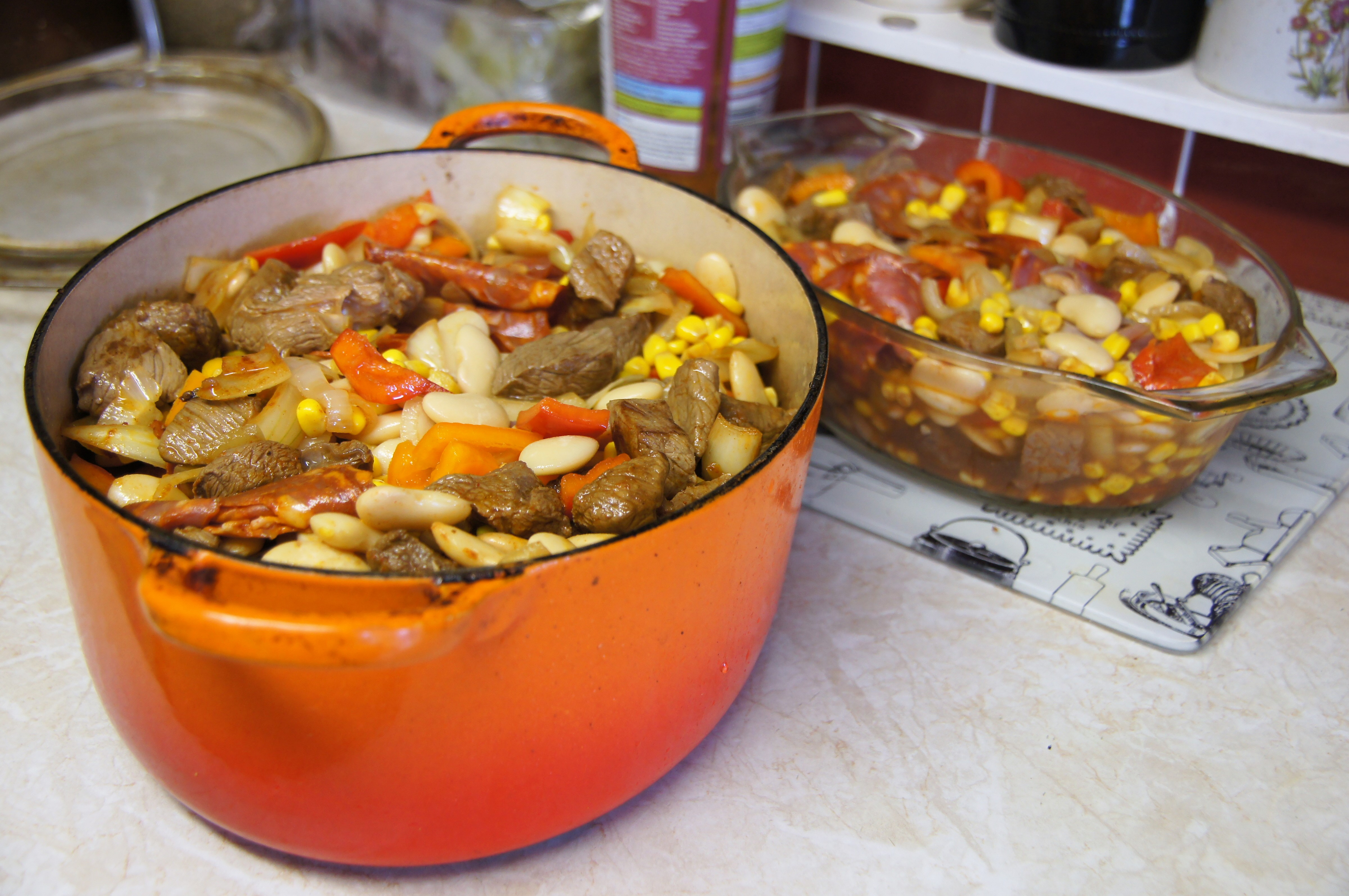 Argentinischer Gemüse- und Fleischeintopf Locro, mit Rindfleisch und Chorizo.